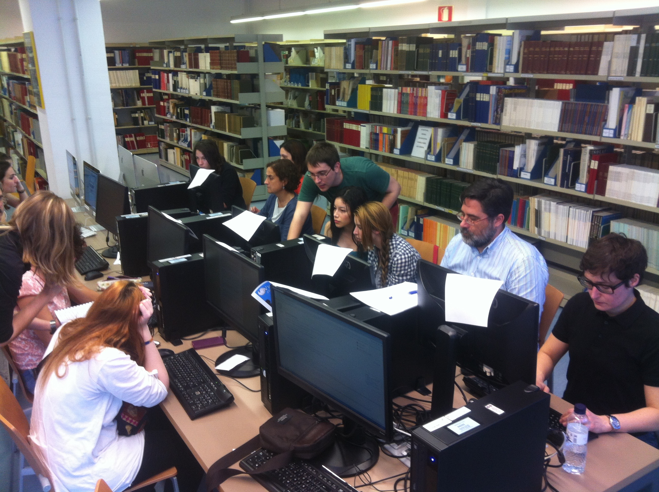 Viquimarató FBID